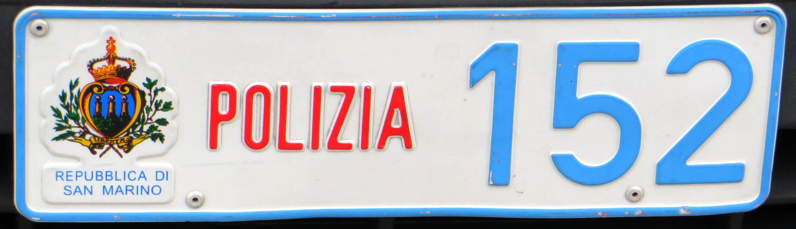 kentekenplaat San Marino